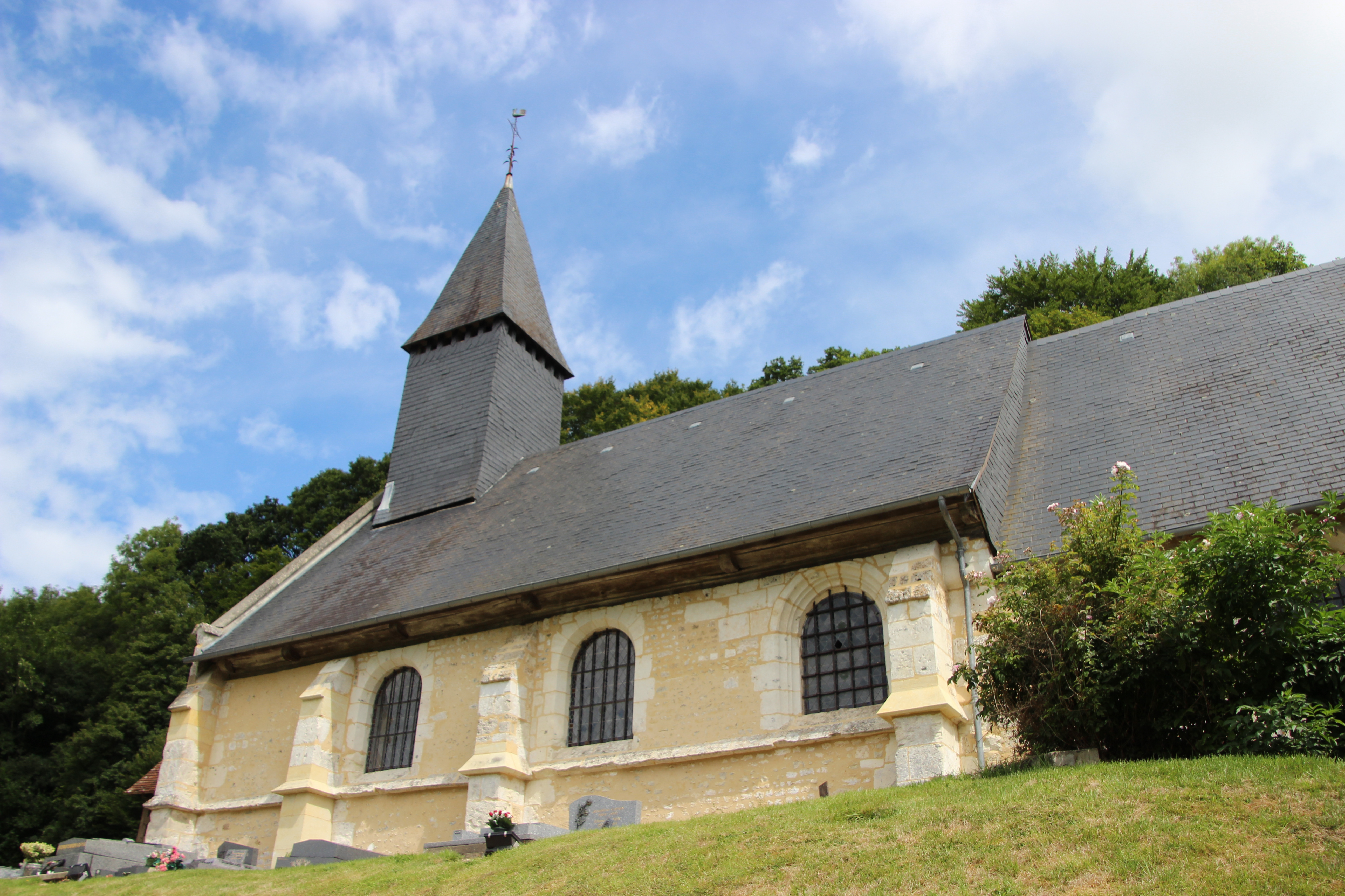 église Le Brévedent